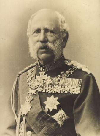 Porträtfoto König Albert von Sachsen